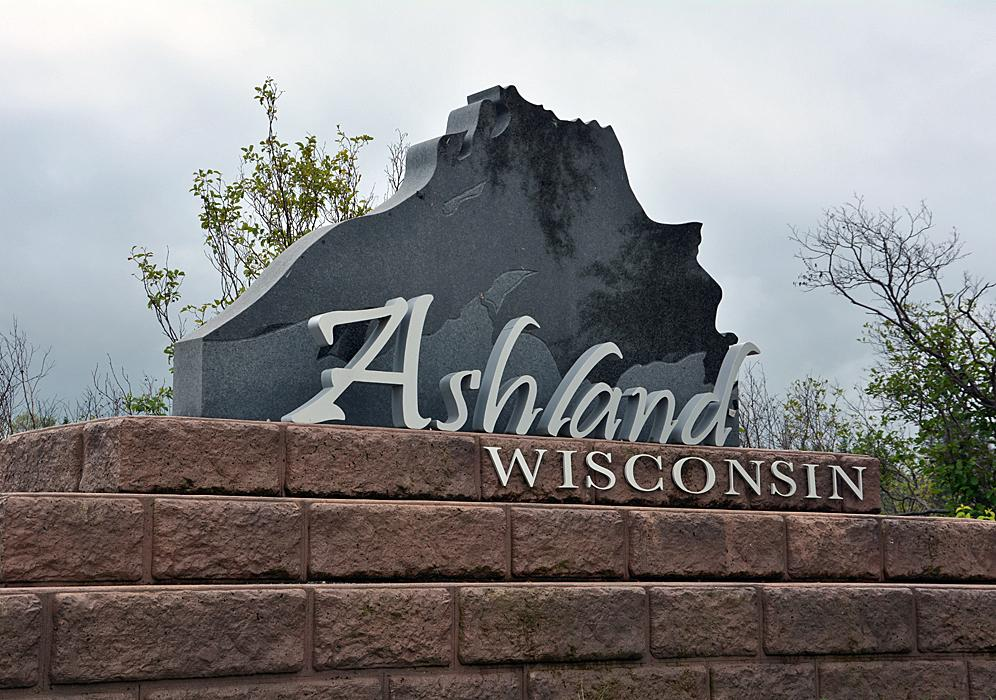 Asland, Wisconsin